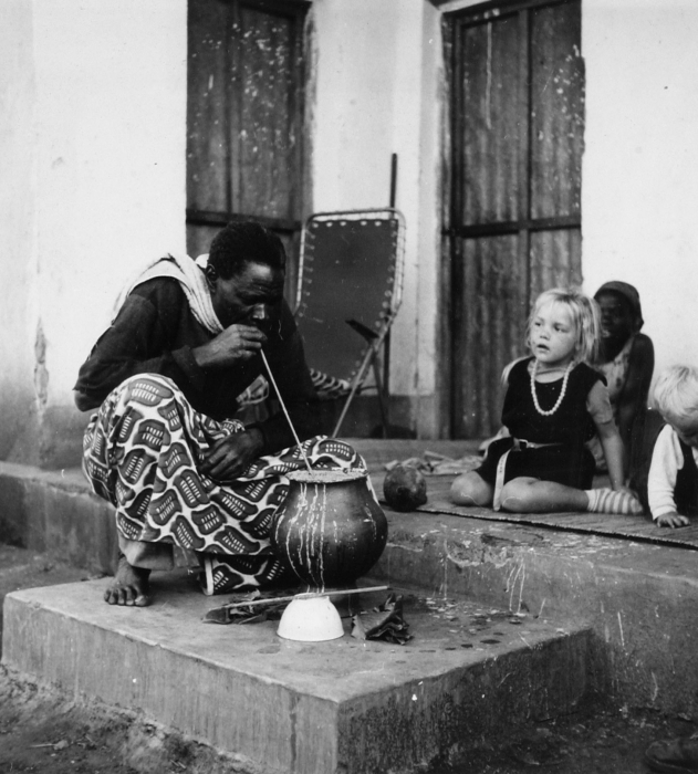 Dr. Thoden van Velzen werkte in het Malila dorp Ibala dat aan de zuidelijke rand van Umalila in het Ulambya district (Bulambia) lag. Hij deed hier in 1966-1968 veldonderzoek met Van Hekken voor hun studie naar landschaarste en rurale gelijkheid in het toenmalige Rungwe district (Walsh, 1998)